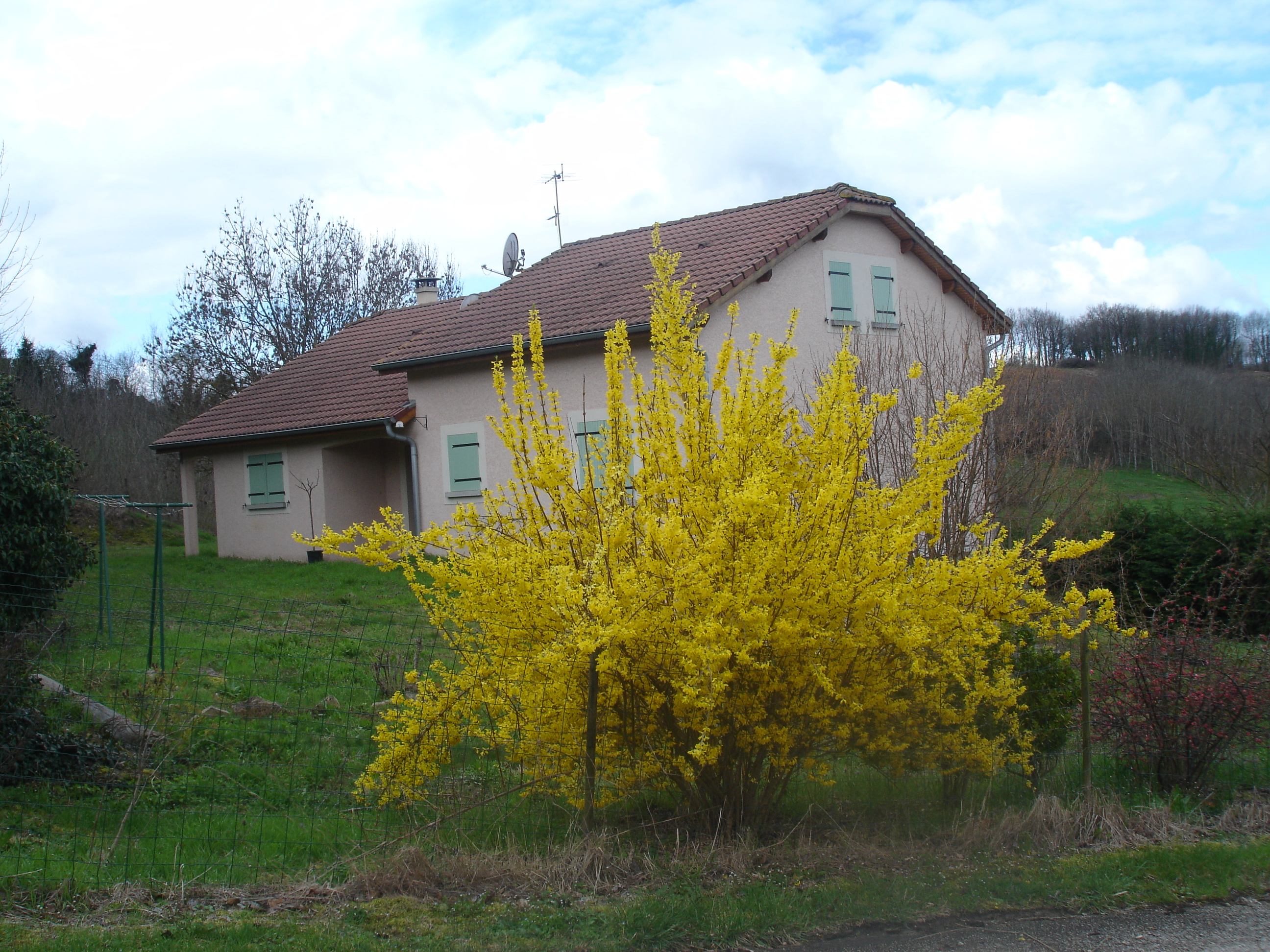 Annoisin-Chatelans : Forsythia au hameau du Mollard